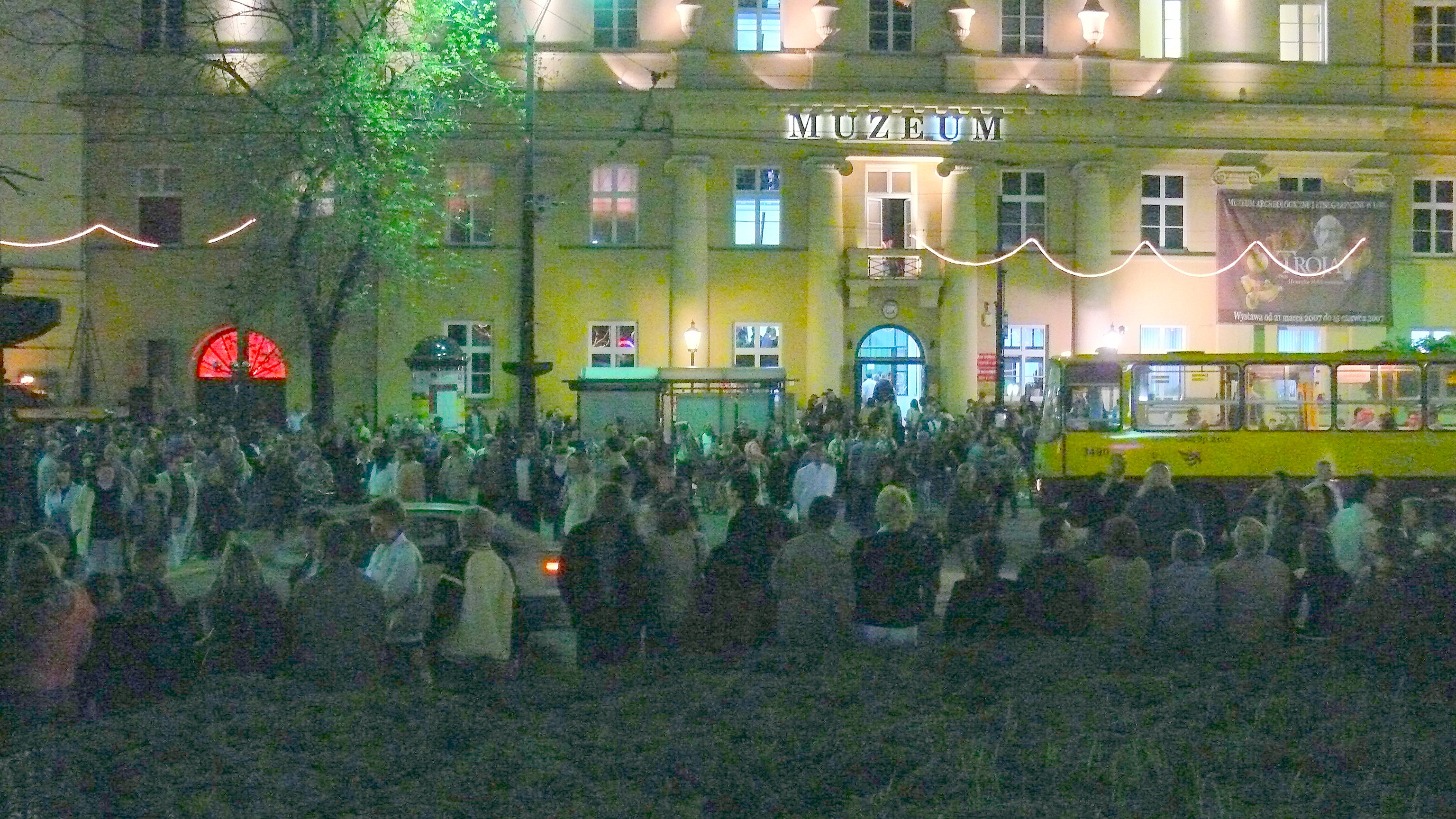 Noc Muzeów 2007 w Łodzi